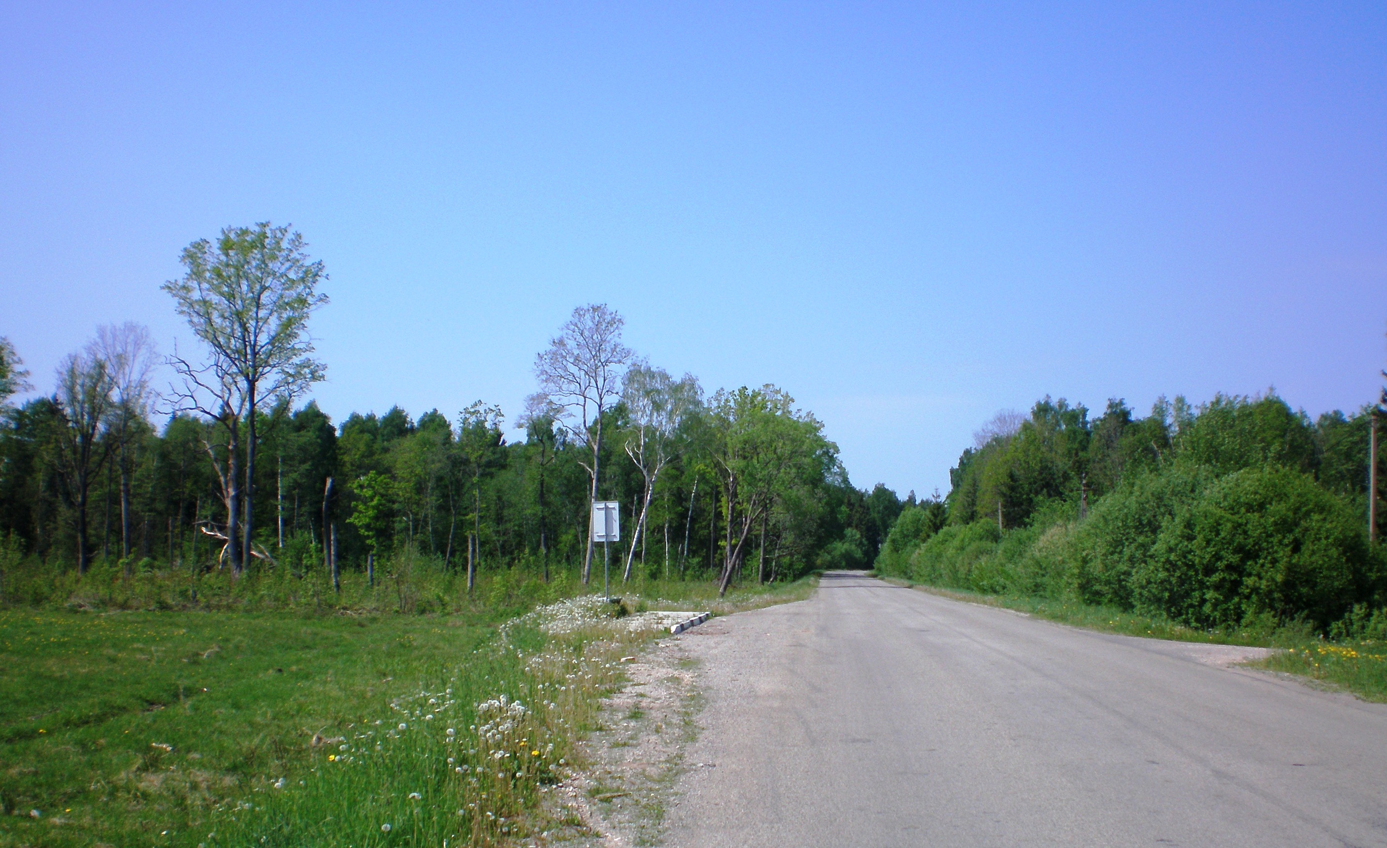 Bosque de Krakės, Lituania